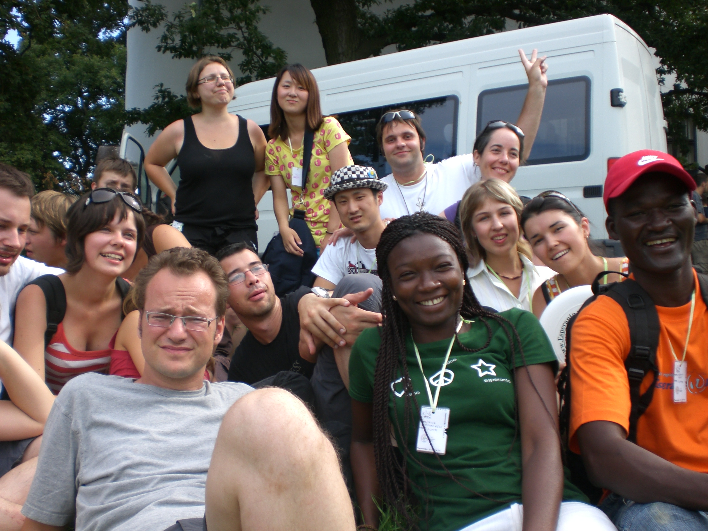 Anoj de la IJK 2008 dum la ekskurso al Balatono